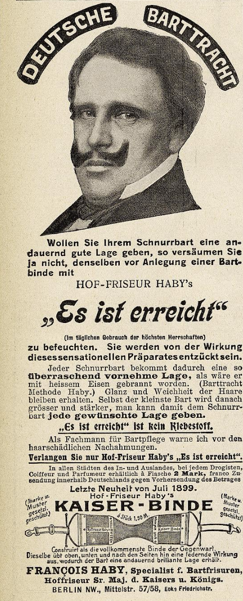 Werbeanzeige für die Es ist erreicht-Bartwichse vom Hof-Friseur François Haby, 1900 (mit einem Portrait von François Haby)